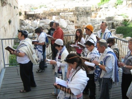 מתפללים בכותל המסורתי